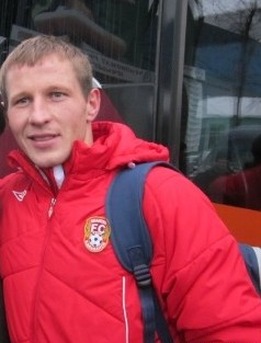 Вичюс после матча, возле автобуса клуба «Шахтёр»